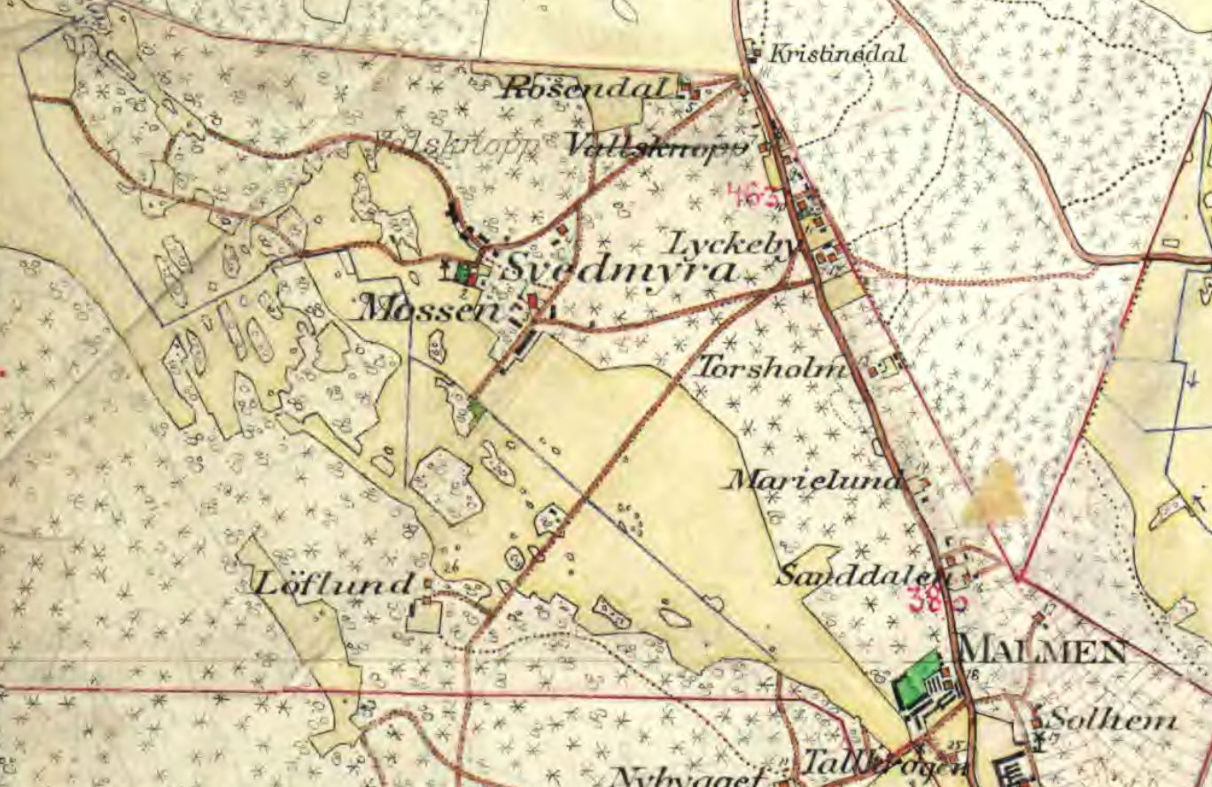 Del av Häradsekonomiska kartan visande Mossens gård i nuvarande stadsdelen Tallkrogen